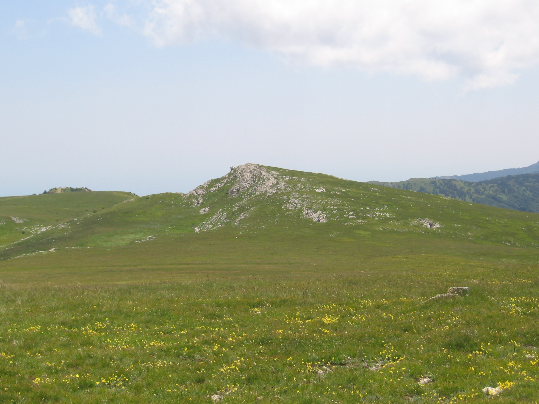 Тас-Тепе: Фото